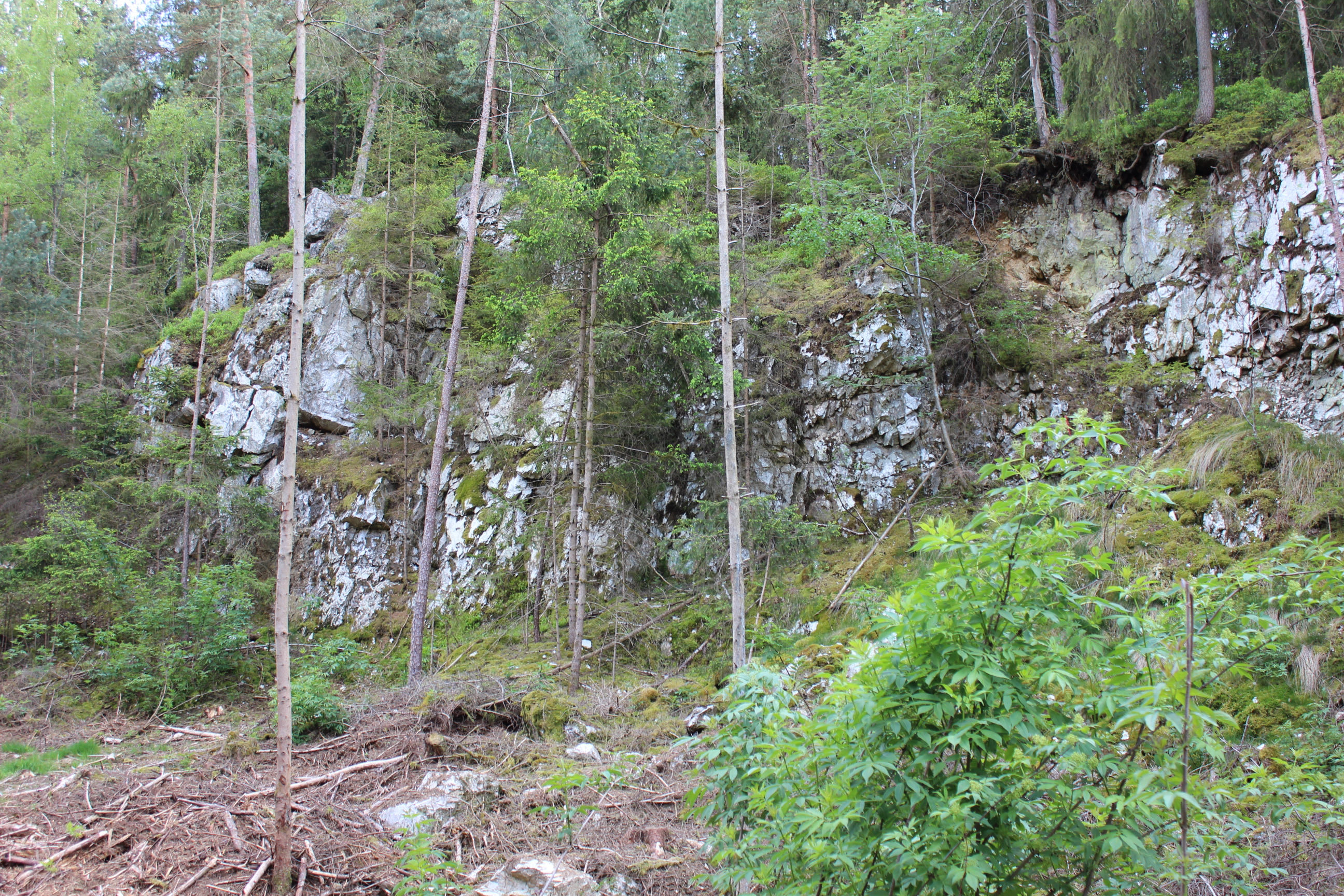 Geotop "Hofpfahl" im Landkreis Regen. Kennung Nr. 276R03